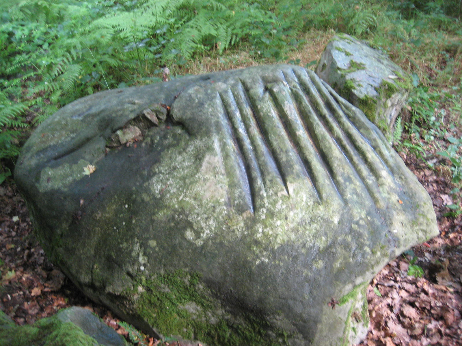 Polissoir du chateau d'eau à Faÿ